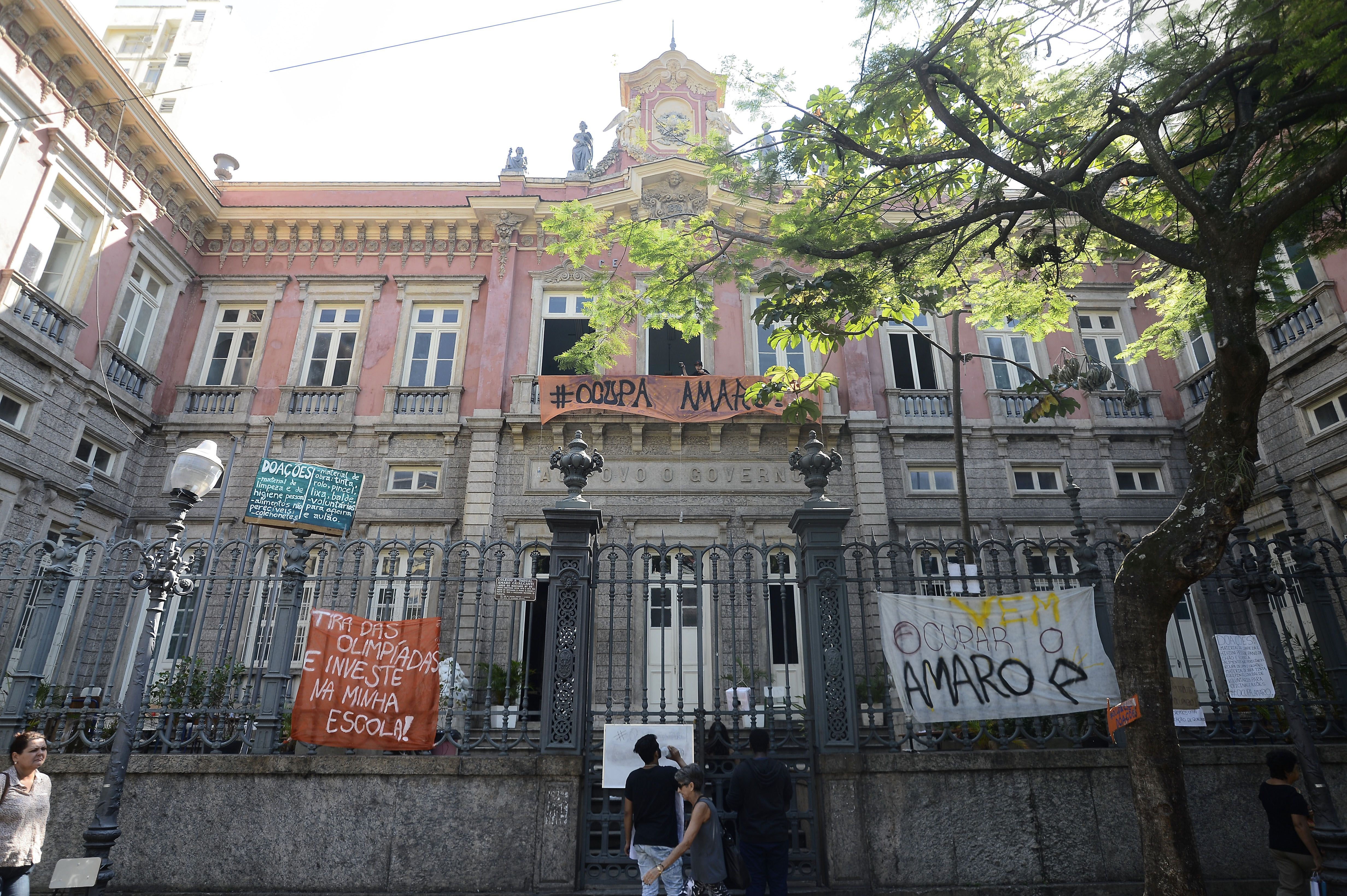 Rio de Janeiro - Estudantes secundaristas que ocupam o C.E. Amaro Cavalcanti e fazem manifestação contra cortes na educação e melhoria na qualidade de ensino (Tânia Rêgo/Agência Brasil)